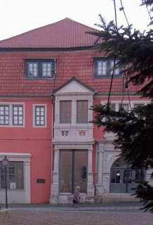 Zum Artikel selbst angefertigt Juergen Bode